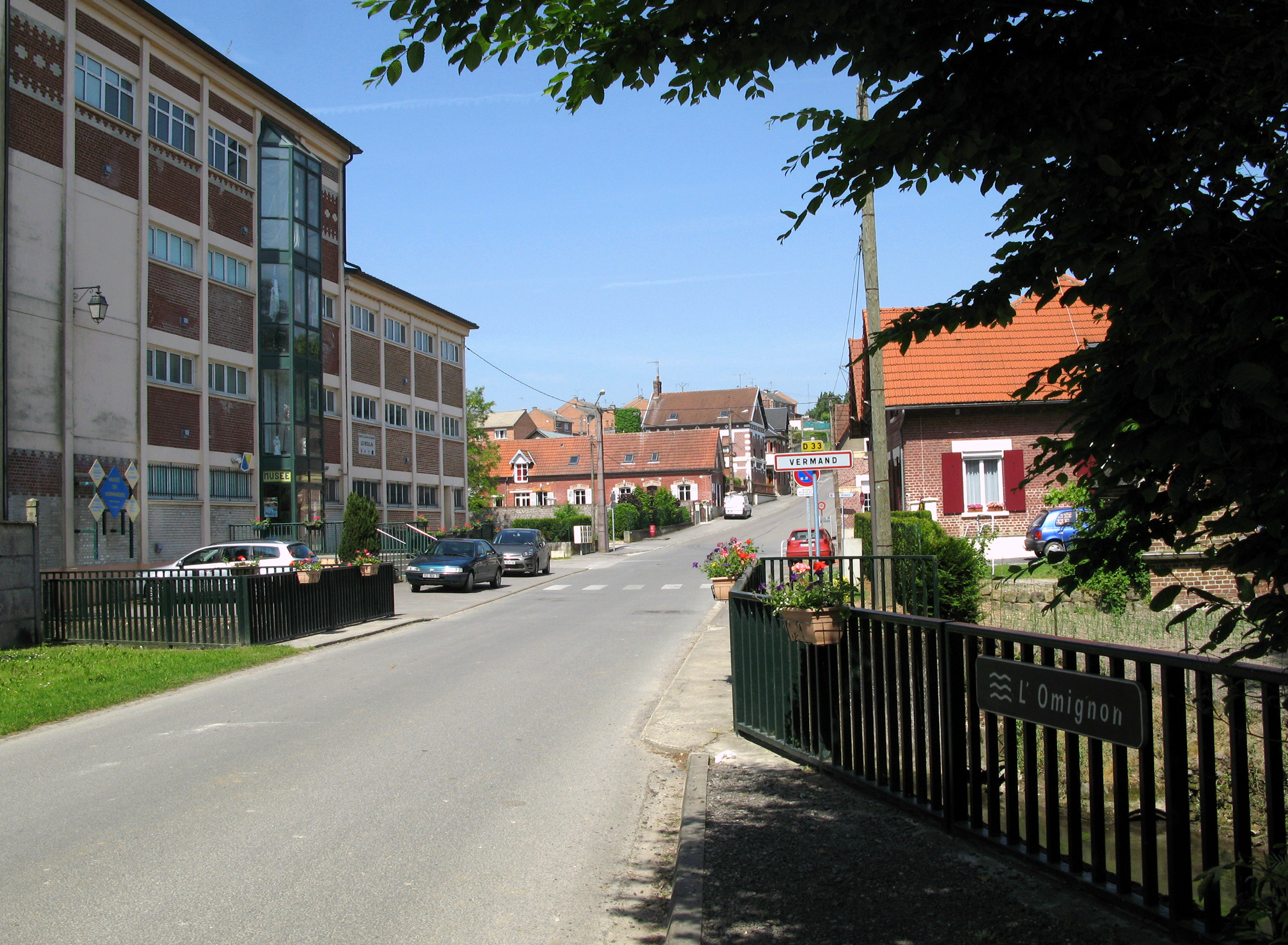 Vermand (Aisne, France) - L'entrée dans la ville par le pont sur la rivière "Omignon". A gauche, se dresse le "Musée du Vermandois".